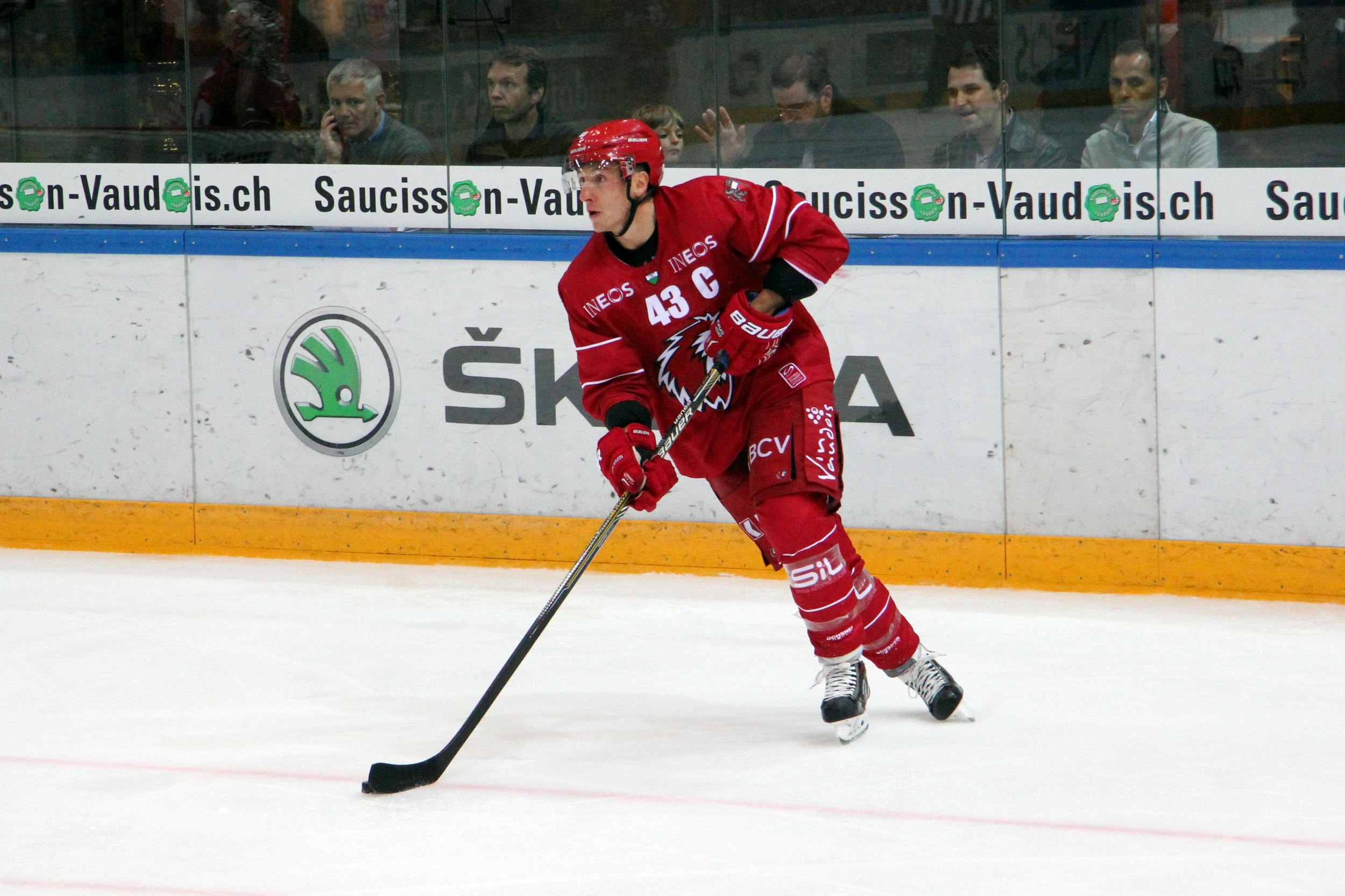 John Gobbi (L 43).